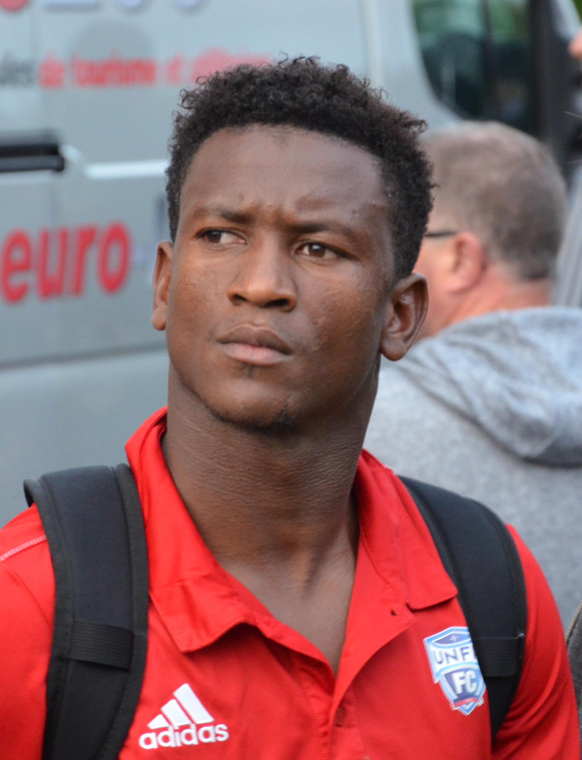 Photographie prise lors du match opposant le SM Caen à l'UNFP en match amical au stade Louis-Villemer de Saint-Lô le 30 juillet 2016. Ici, Abdoulaye Cissé.